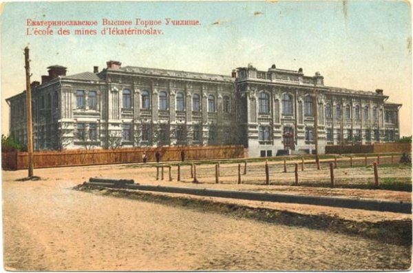 Екатеринославский горный институт (1899-1917)